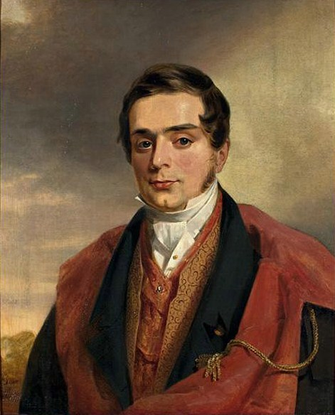 Никита Всеволодович Всеволжский (1799-1862)